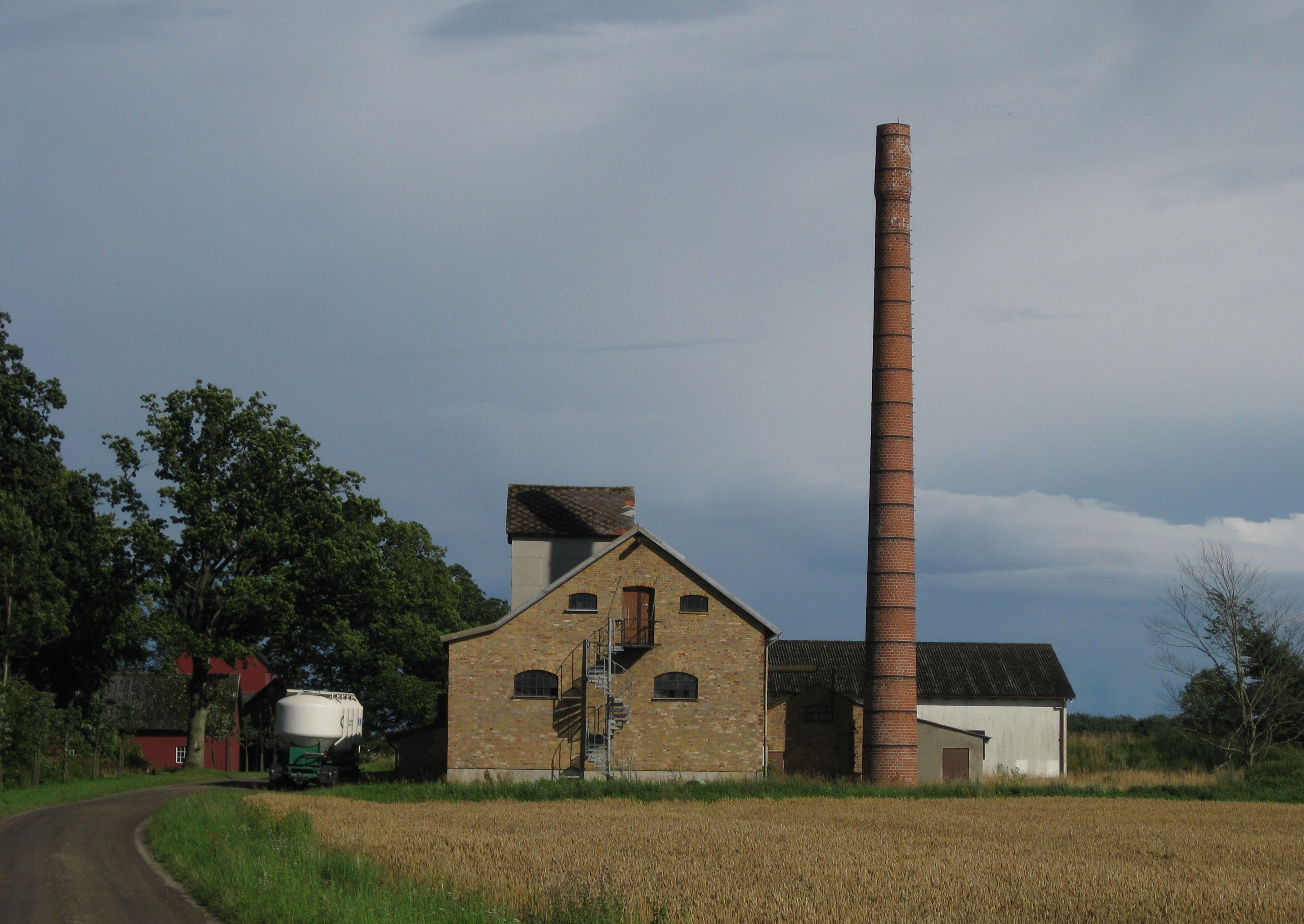 Folkestorps bränneri i Kristianstads kommun